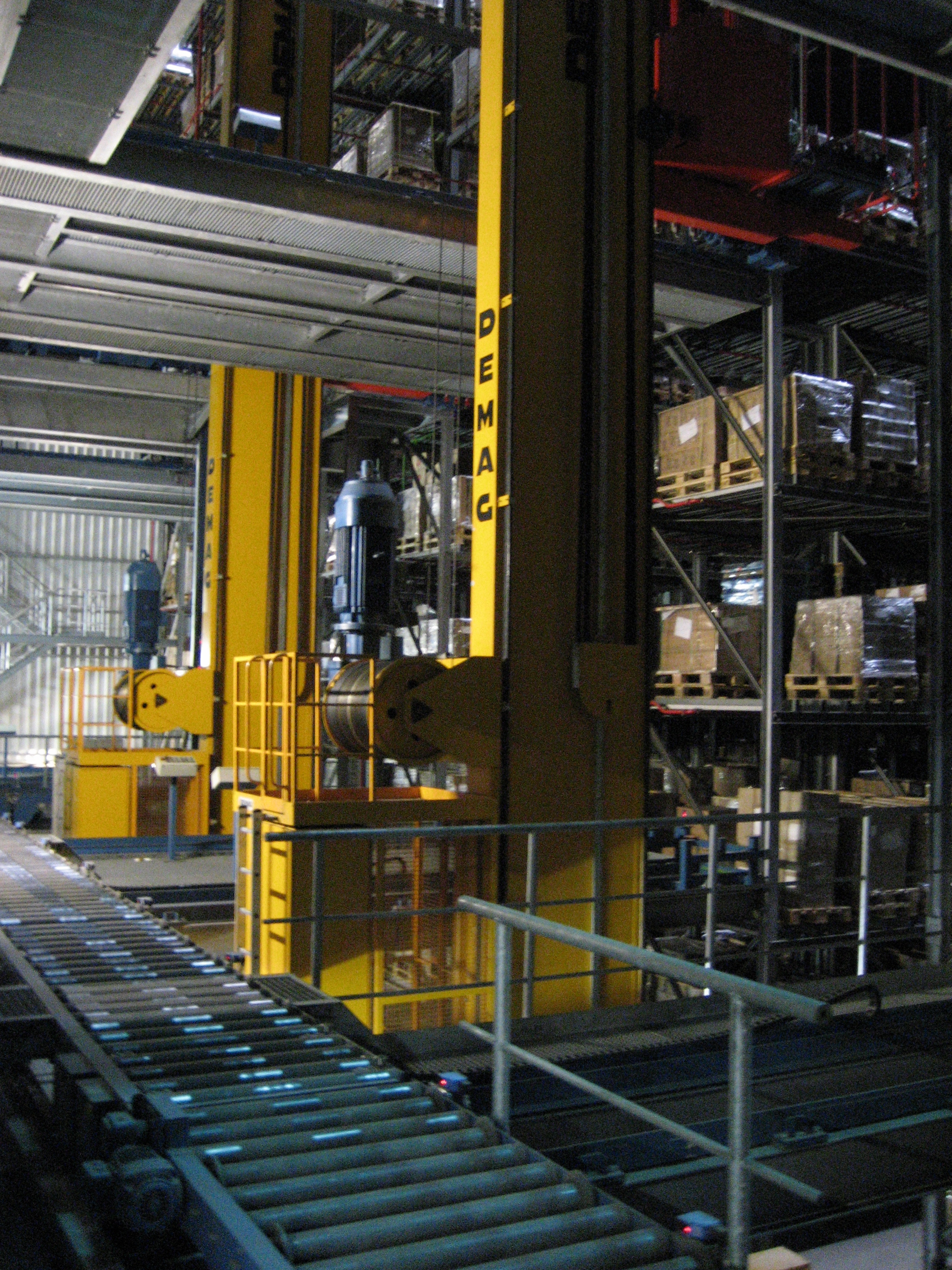 Regalbediengeräte in einem automatisierten Hochregallager für Europaletten der WM-Group, Duisburg